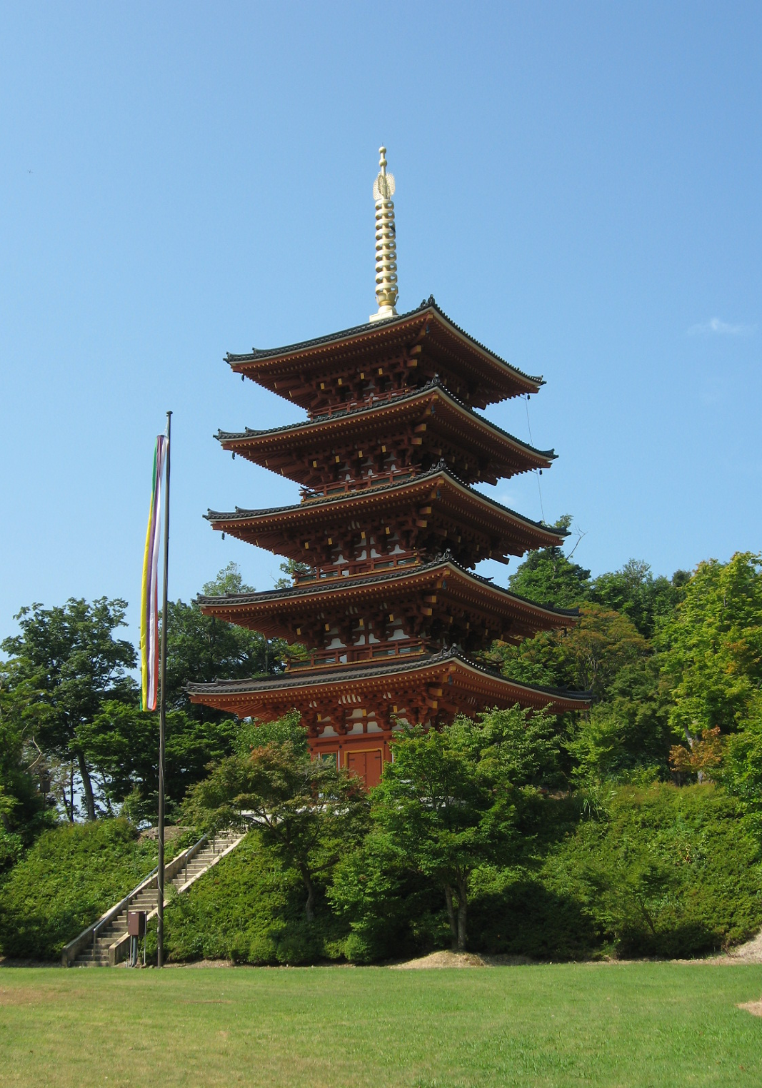 成相寺五重塔